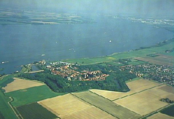 Luchtfoto vestingstad Willemstad